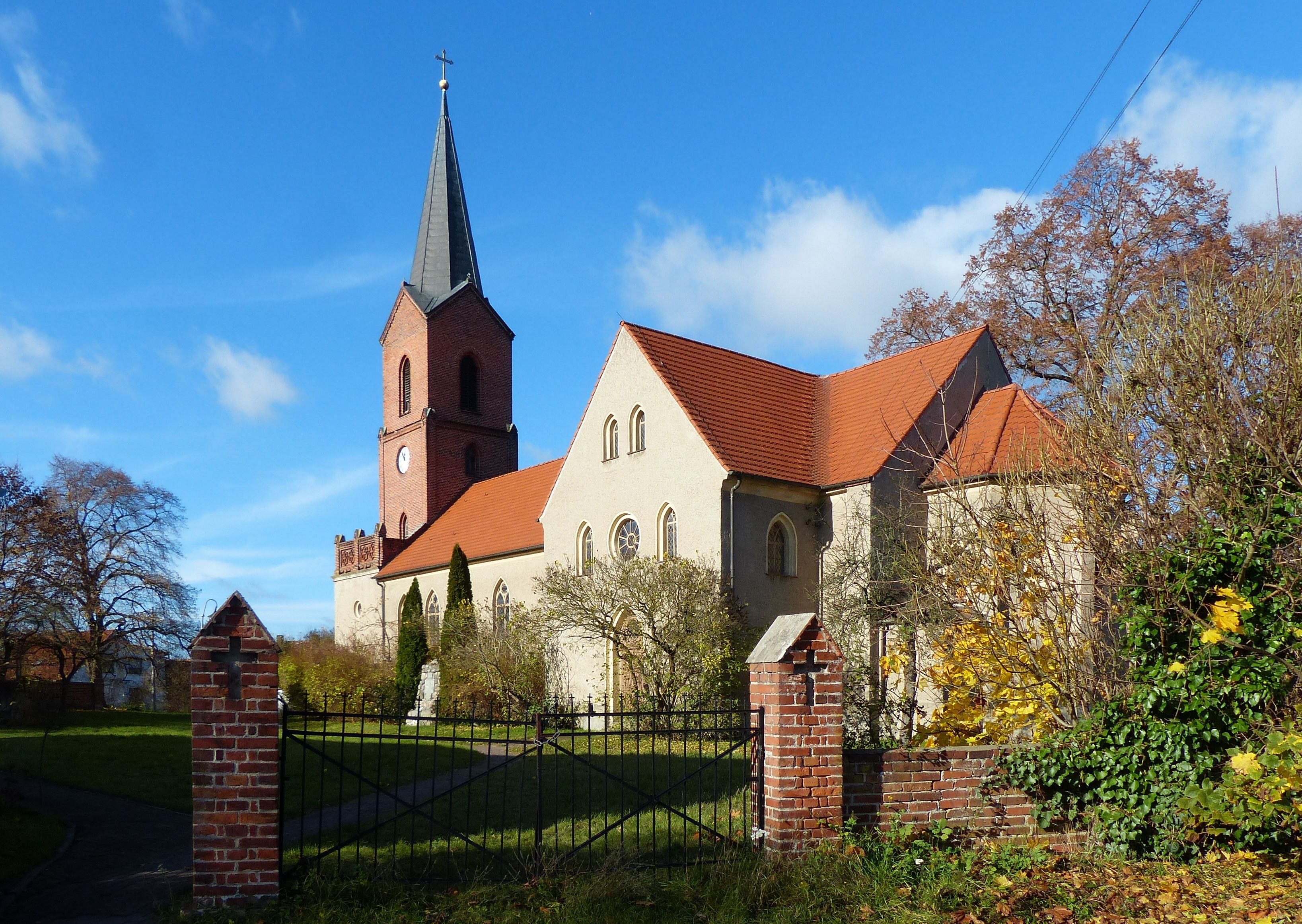 Ein sonniger, später Herbsttag taucht die Südpartie der Kirche in mildes Licht.